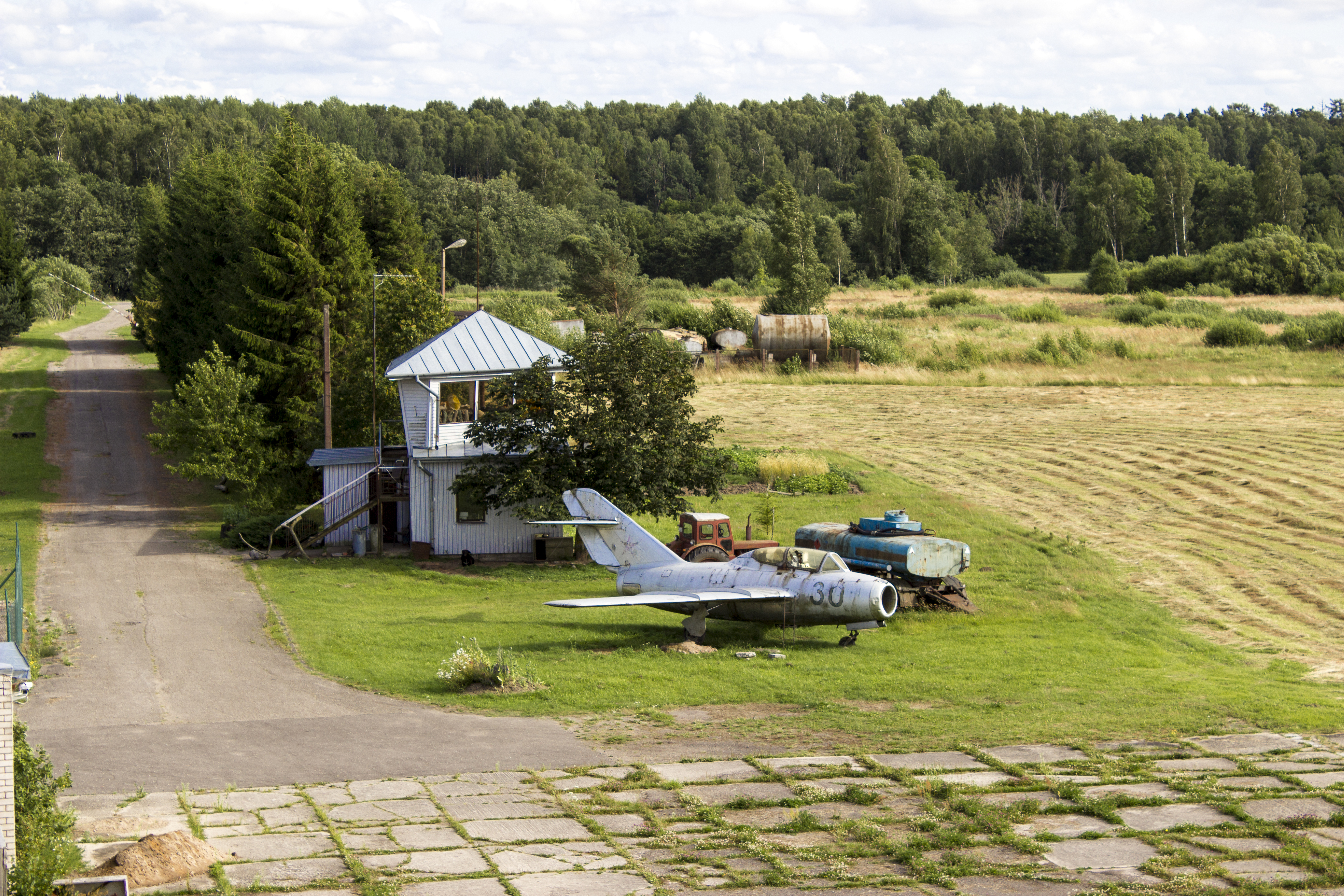 Cīravas lidlauks / aerodrome